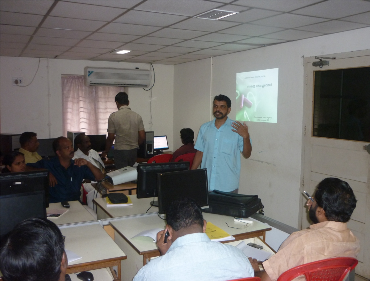 പു. ക. സ. നടത്തിയ ഐ ടി ശില്പശാല